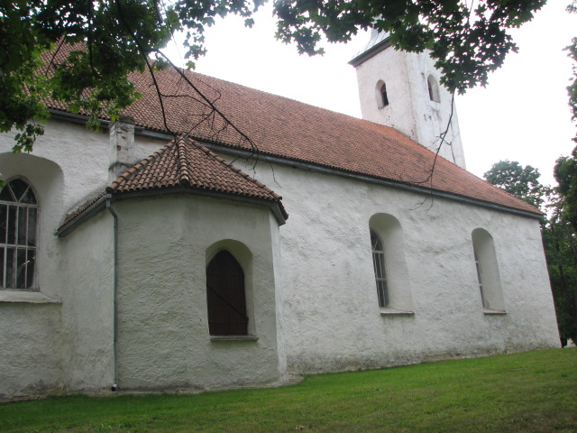 Jõhvi church, Jõhvi, Estonia